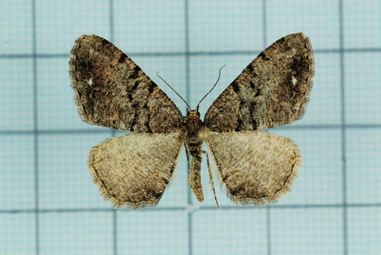 Parectropis subflava (Bastelberger, 1909) 雙白斑尺蛾 臺灣尺蛾科圖鑑 2 P.234 female